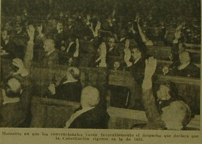 Convención Constituyente de 1957. Los convencionales votan la resolución que declara en vigencia la Constitución de 1853.